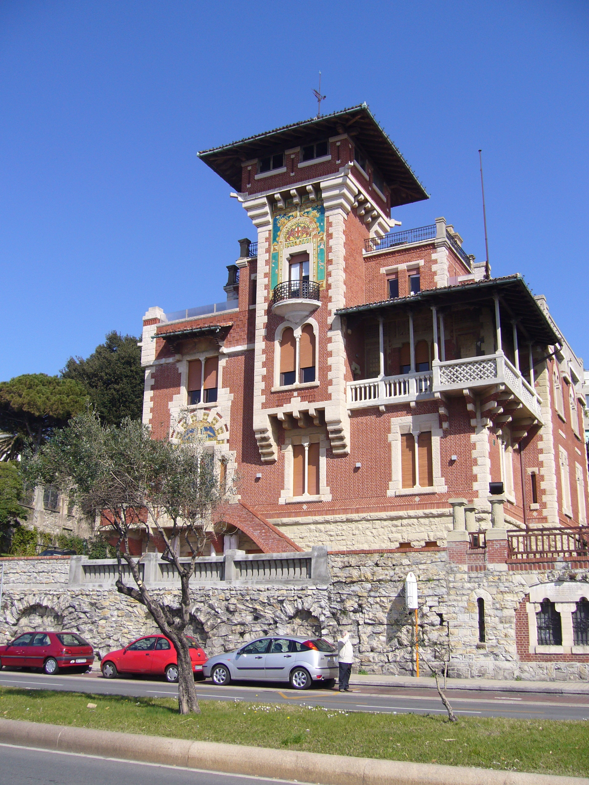 Corso Italia - Palazzo in stile spagnolo